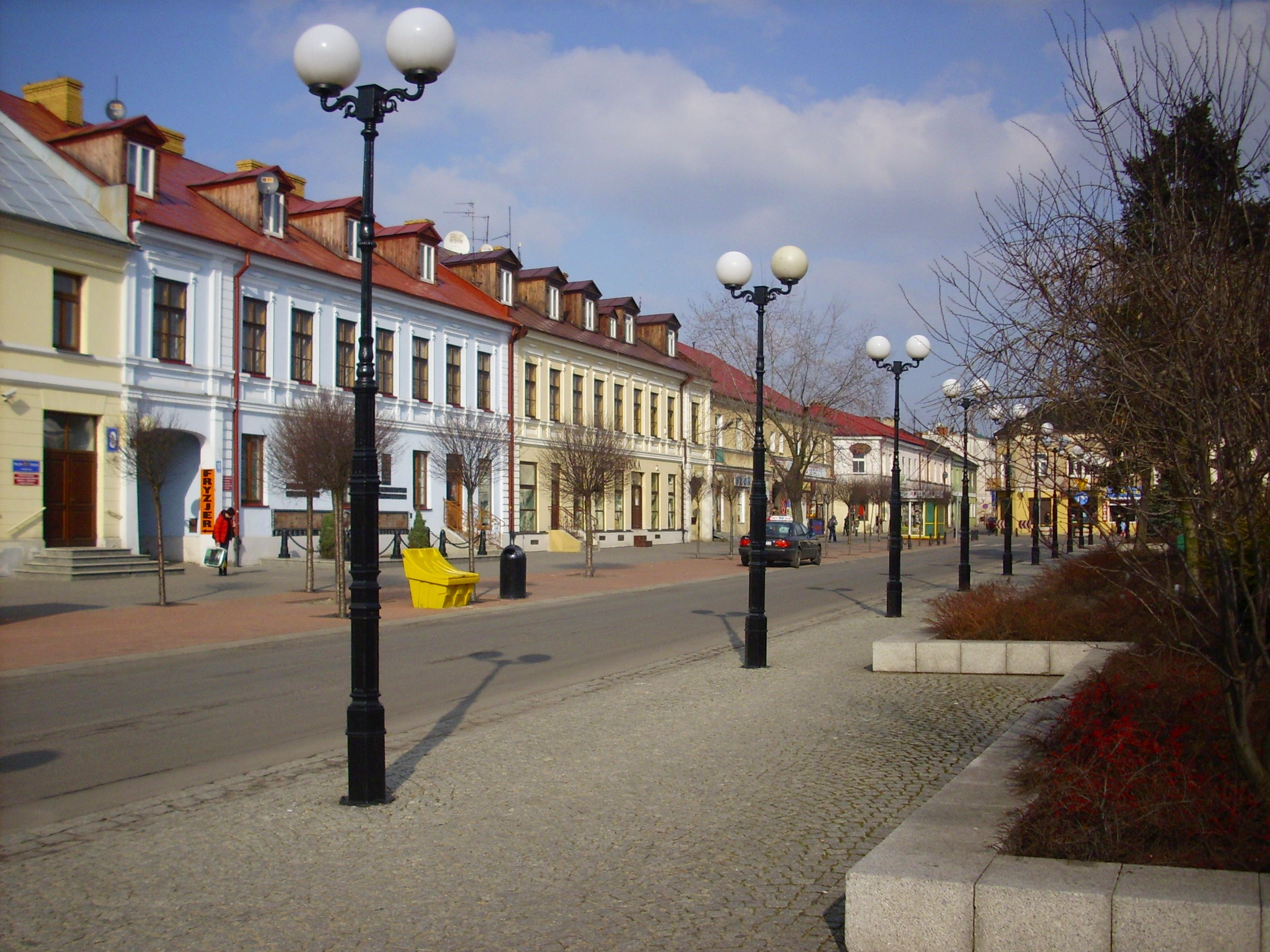 Biała Podlaska, pl. Wolności (Rynek), pierzeja północno-zachodnia.